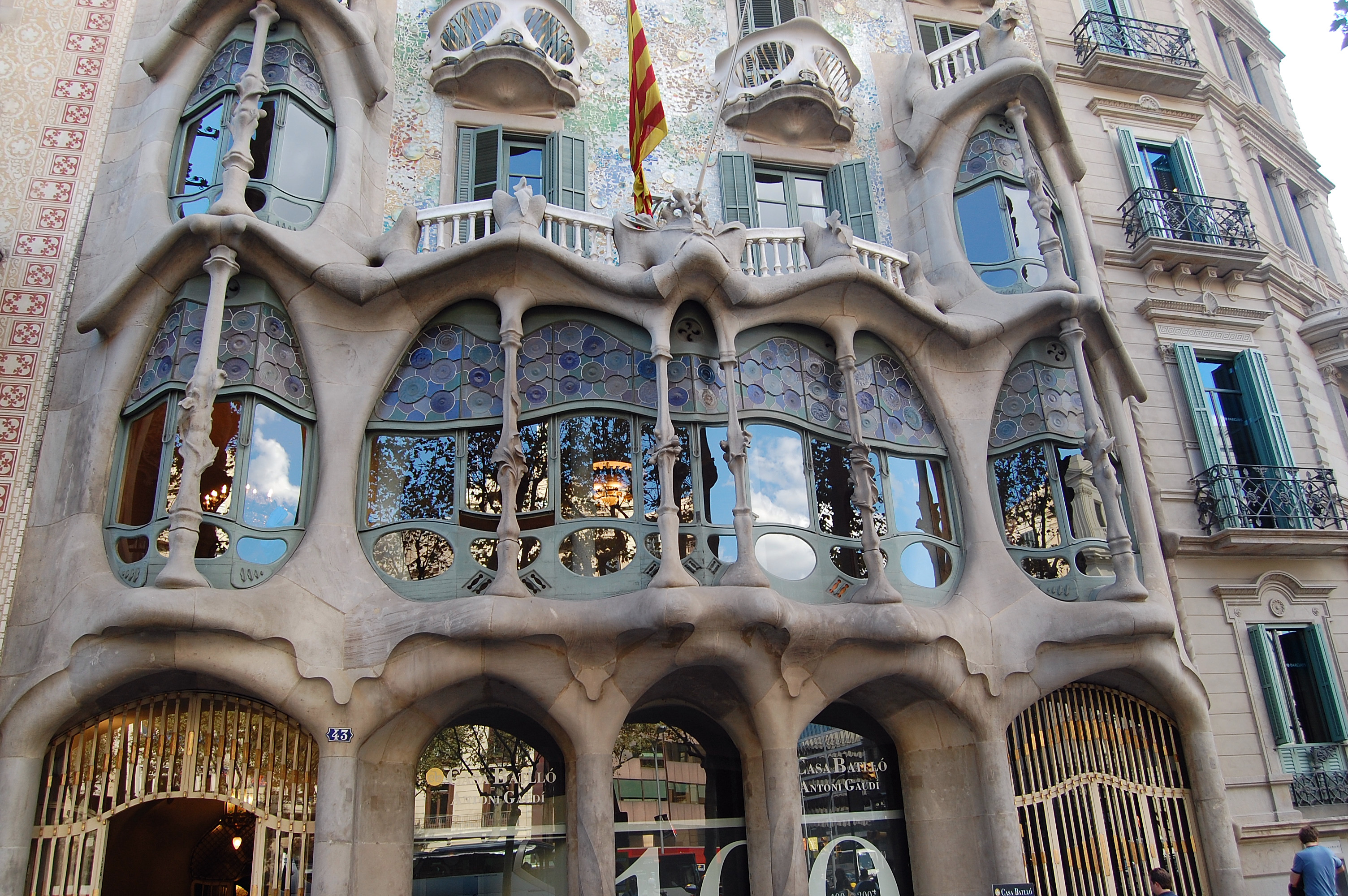 Casa Batlló - Barcellona Antoni Gaudí